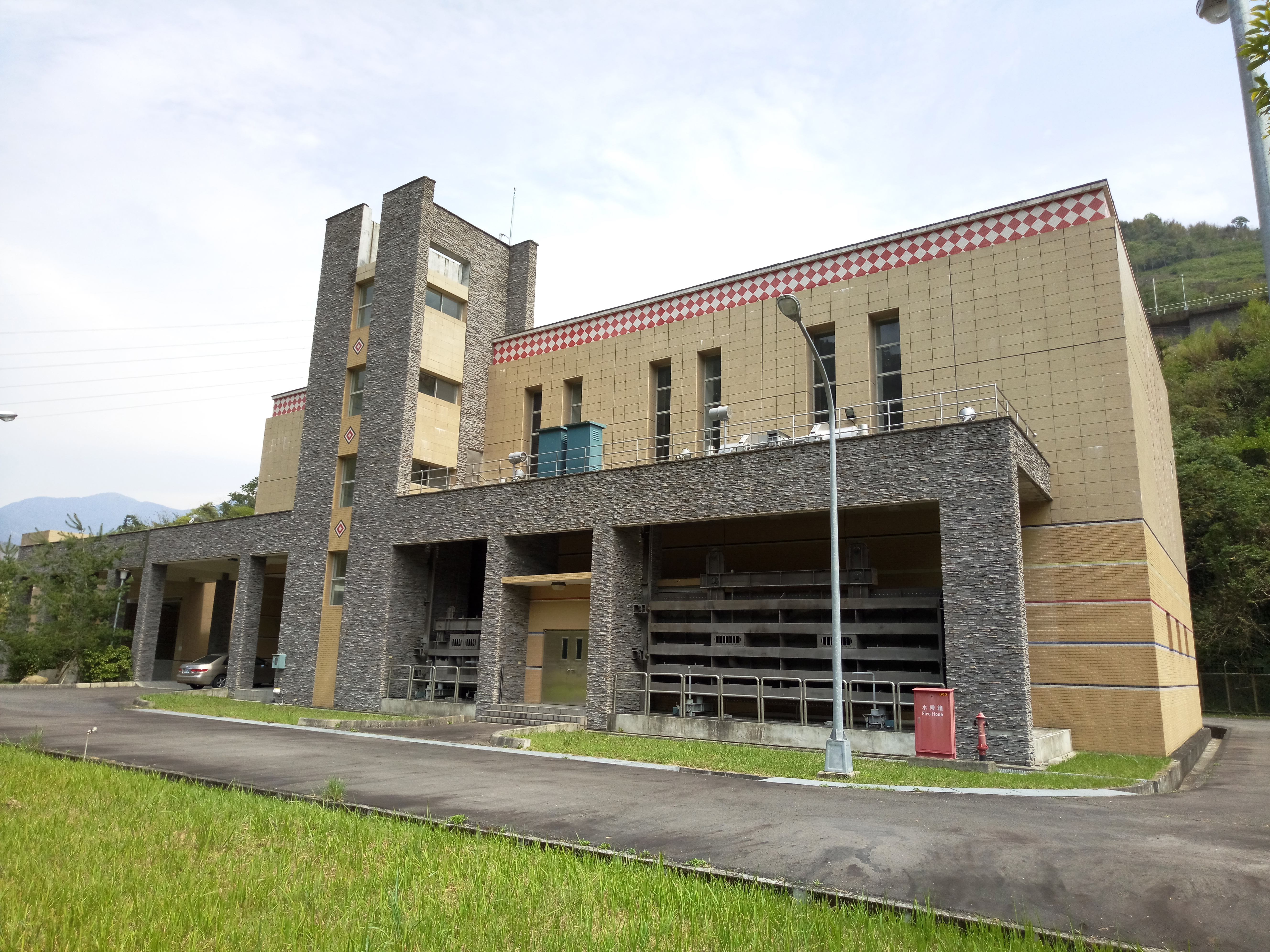 萬大發電廠松林分廠廠房外觀